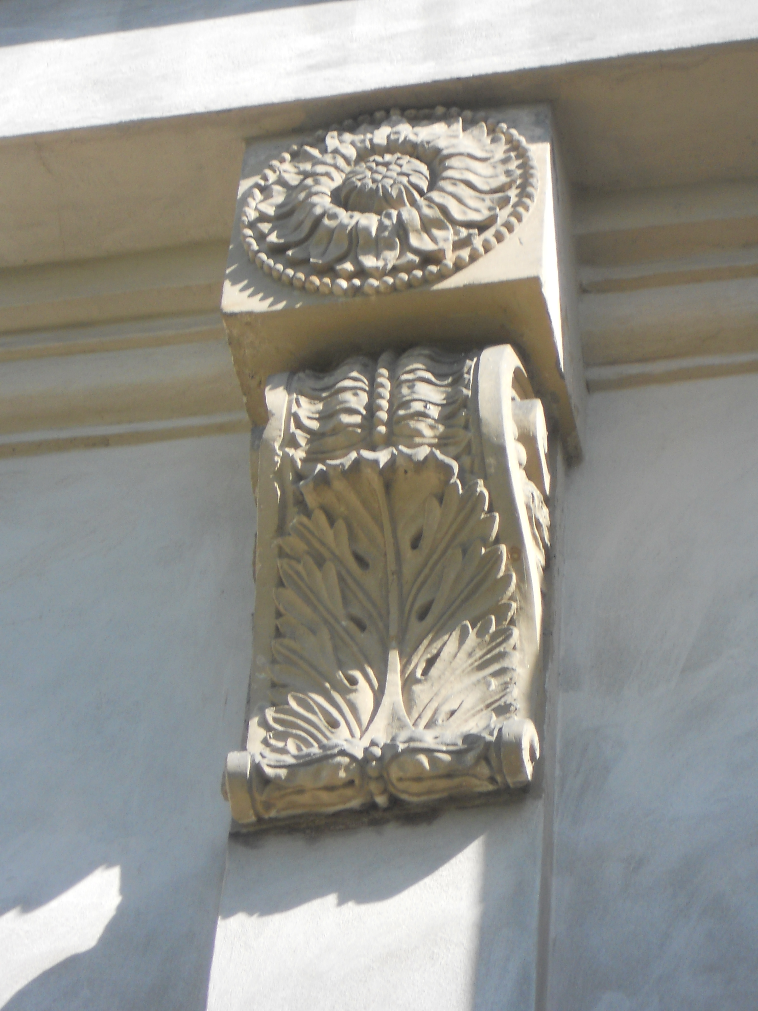 Декоративний елемент костелу святої Дороти в Славуті на Волині.